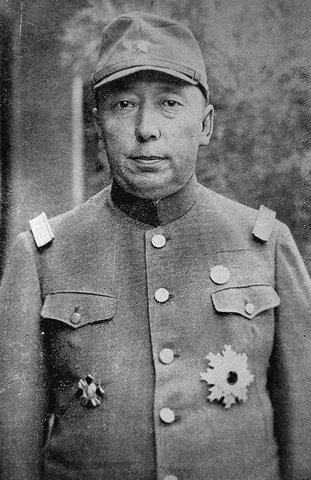 軍服姿の徳王。